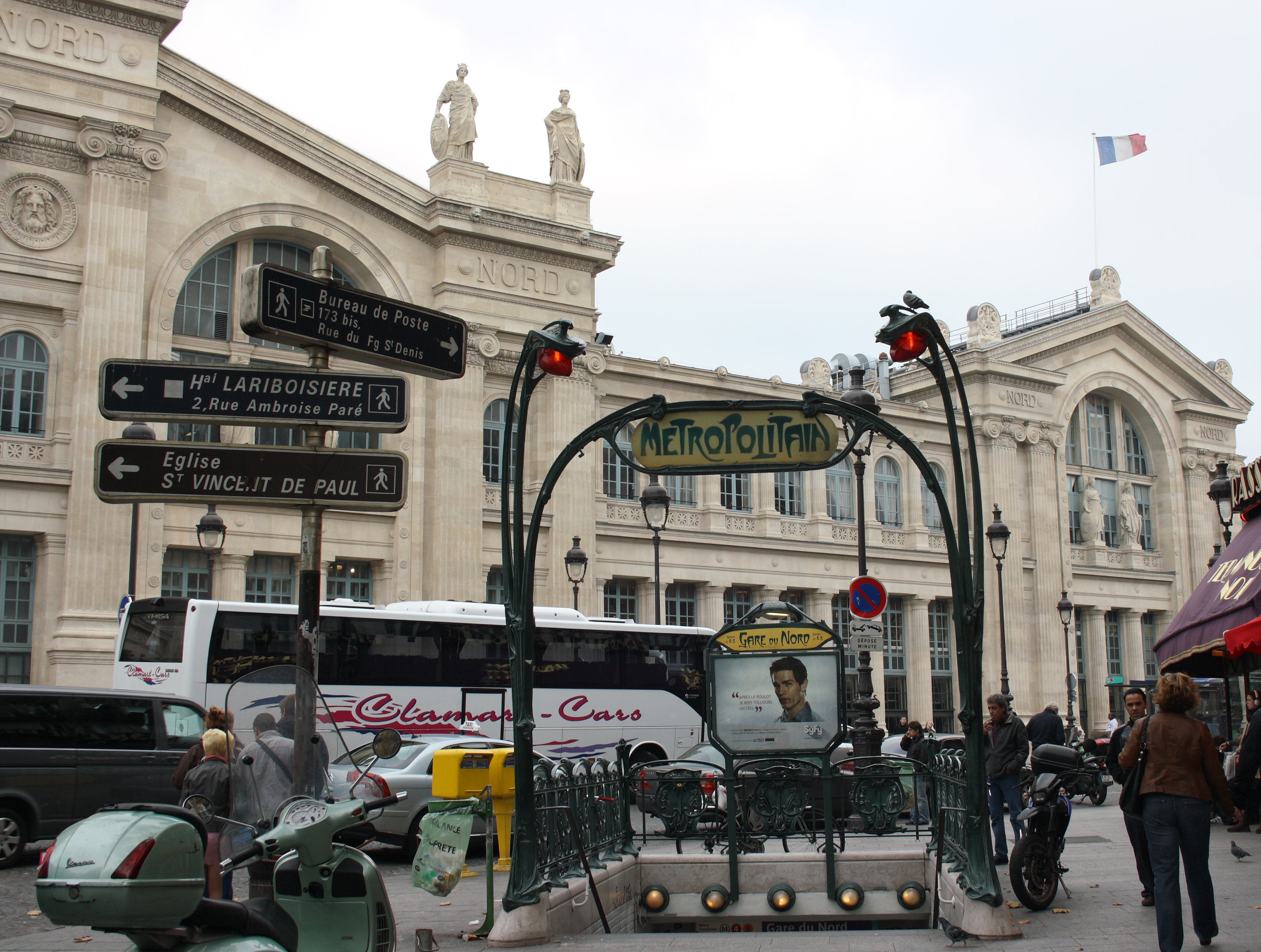 Paris; Metroeingang Boulevard de Denain/Place Napoléon III der Linie 4 und 5, gestaltet von Hector Guimard